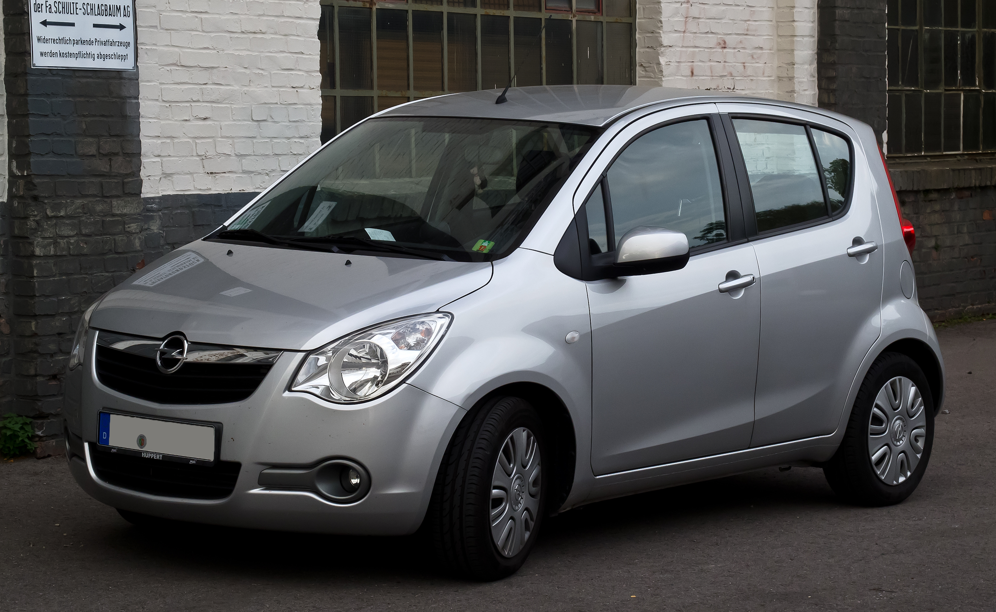 Opel Agila ecoFLEX Edition (B)